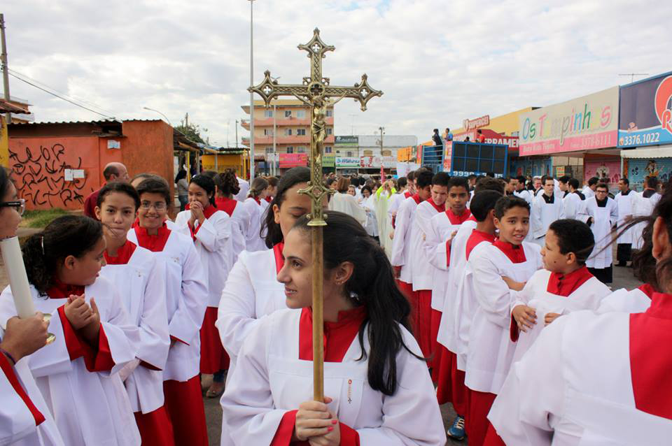 Coroinhas perfilados e enfileirados para a procissão.